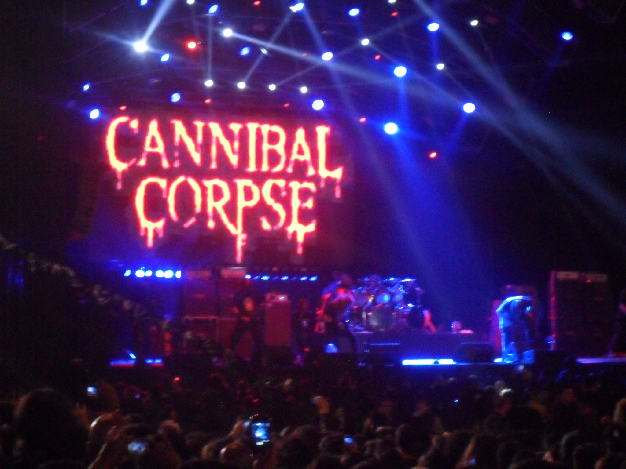 Presentación de la banda en Bogotá durante el festival Rock al Parque 2013.